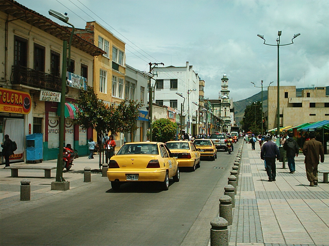 La tome en donde antes quedaba el antiguo tertminal de trasnpore de pasto la foto que aparece en la encarta es de la decada del 80 el terminal de trasnprtes nuevo lo inaguraron en los 90